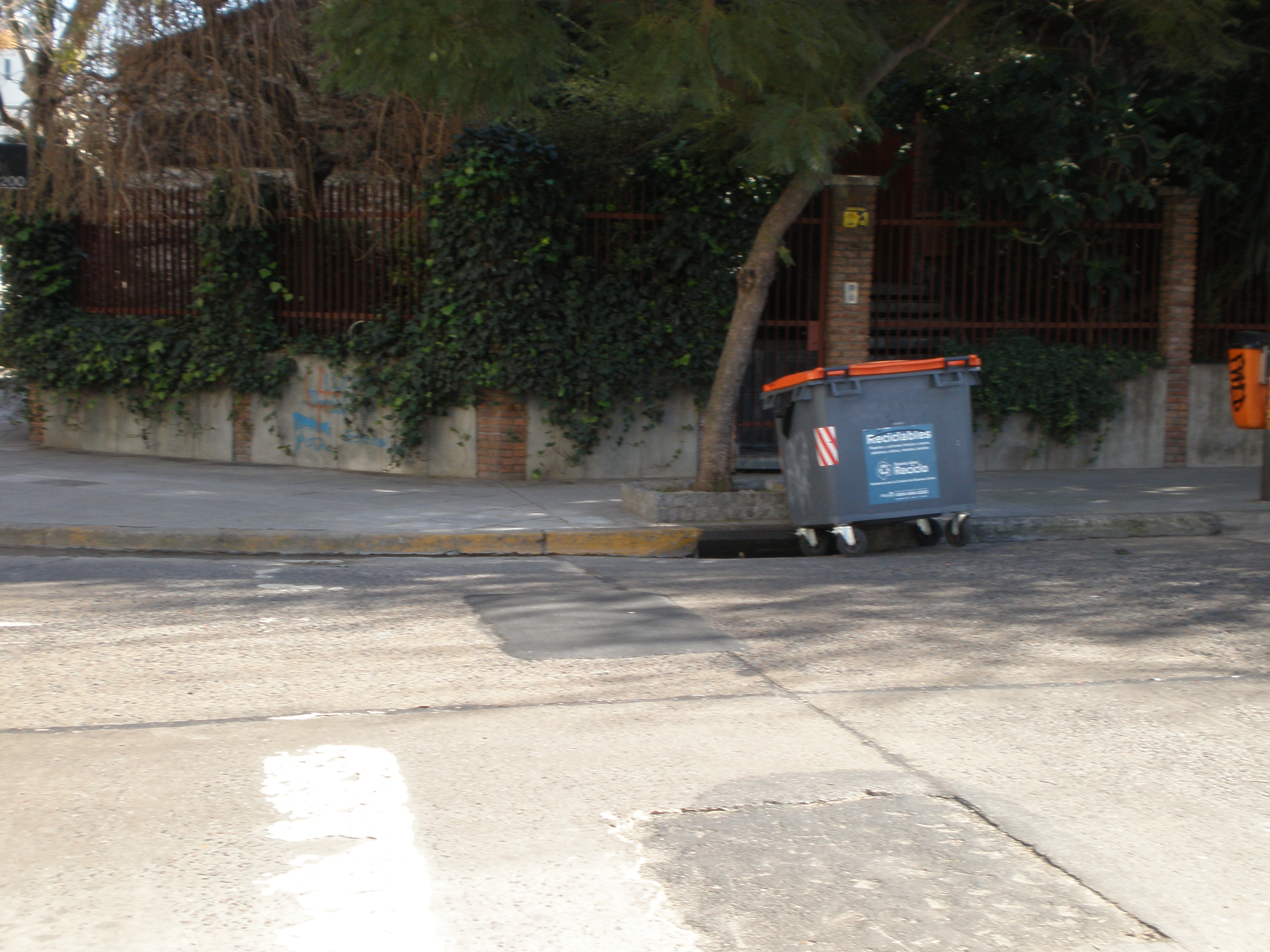 Contenedores de basura reciclable en la Ciudad de Buenos Aires.